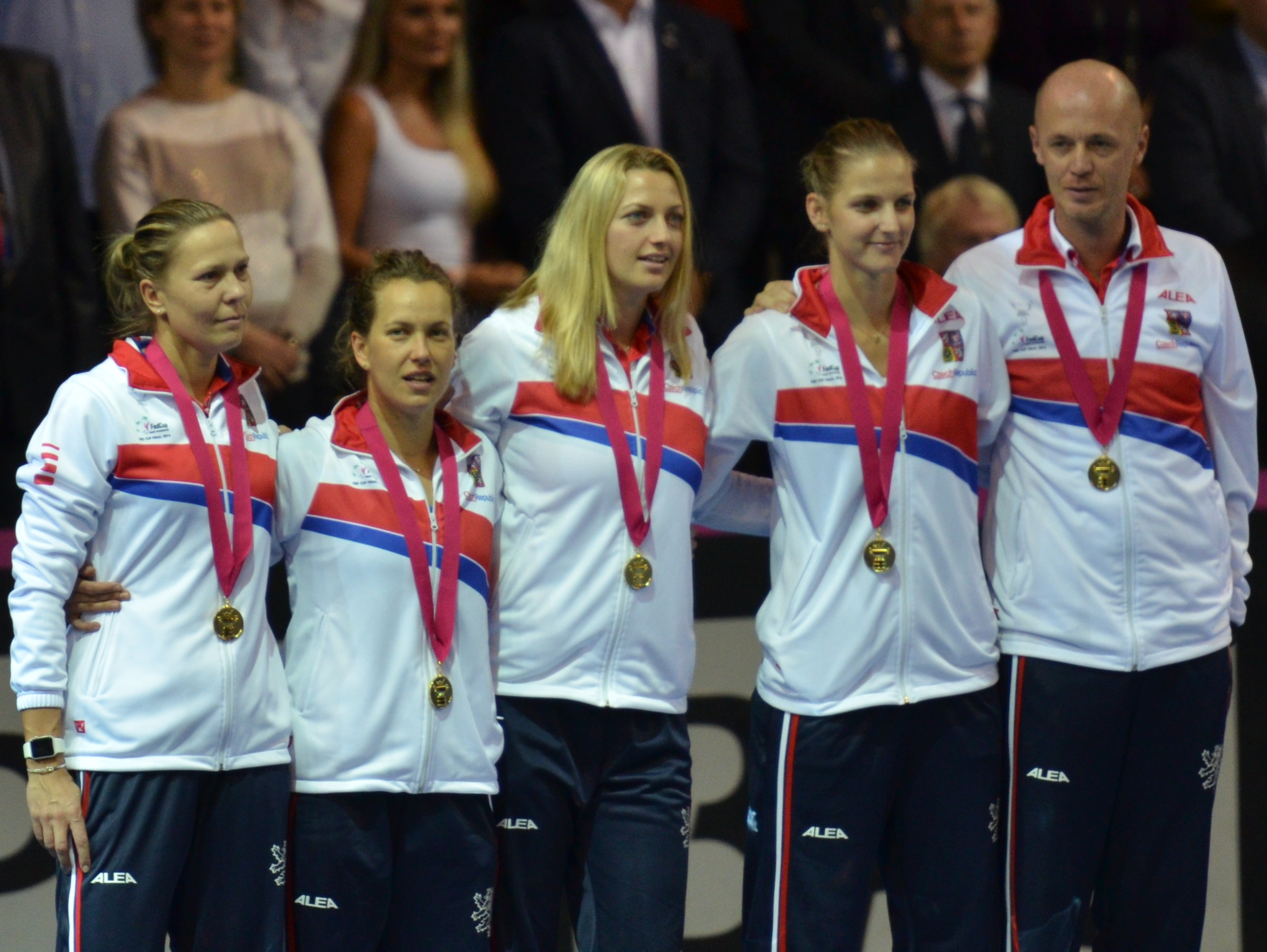 PPP_3491